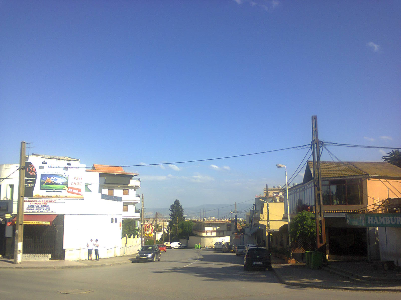 Une vue à partir du quartier de Vieux-Kouba vers l'horizon.